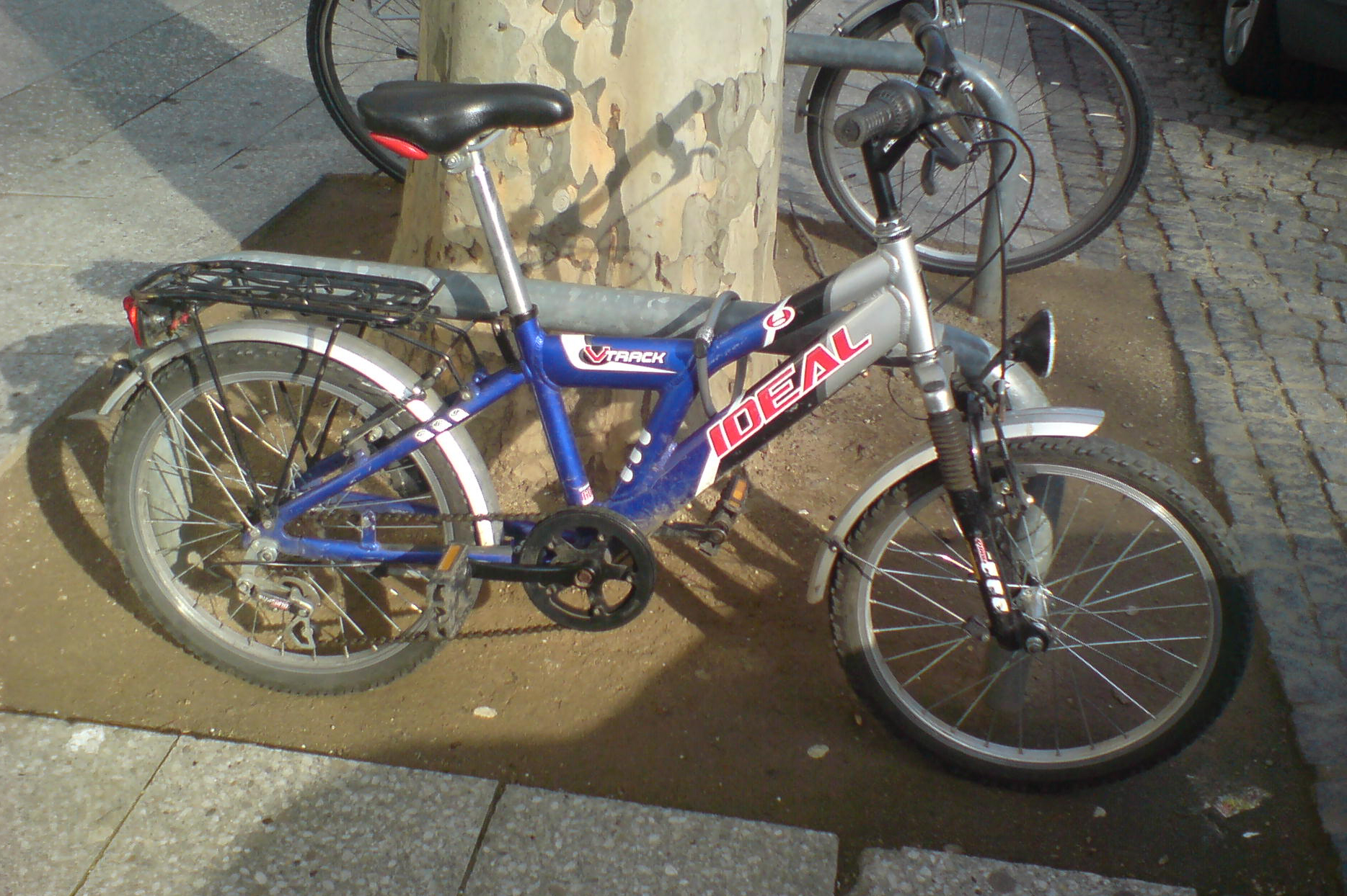 "Ideal V-Track" bike in Frankfurt